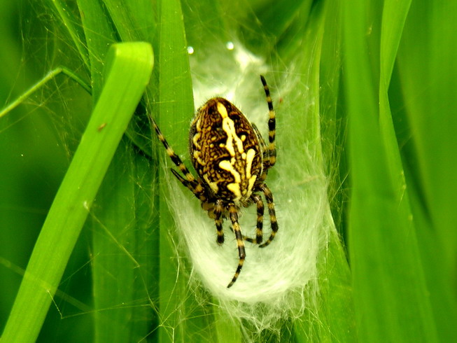 This image was copied from lt. The original description was: Ąžuolalapis verpstūnas (Aculepeira ceropegia) Šeima. Kryžiuočiai (Araneidae) Foto: Algirdas, 2006 m. birželio 8 d., Lietuva